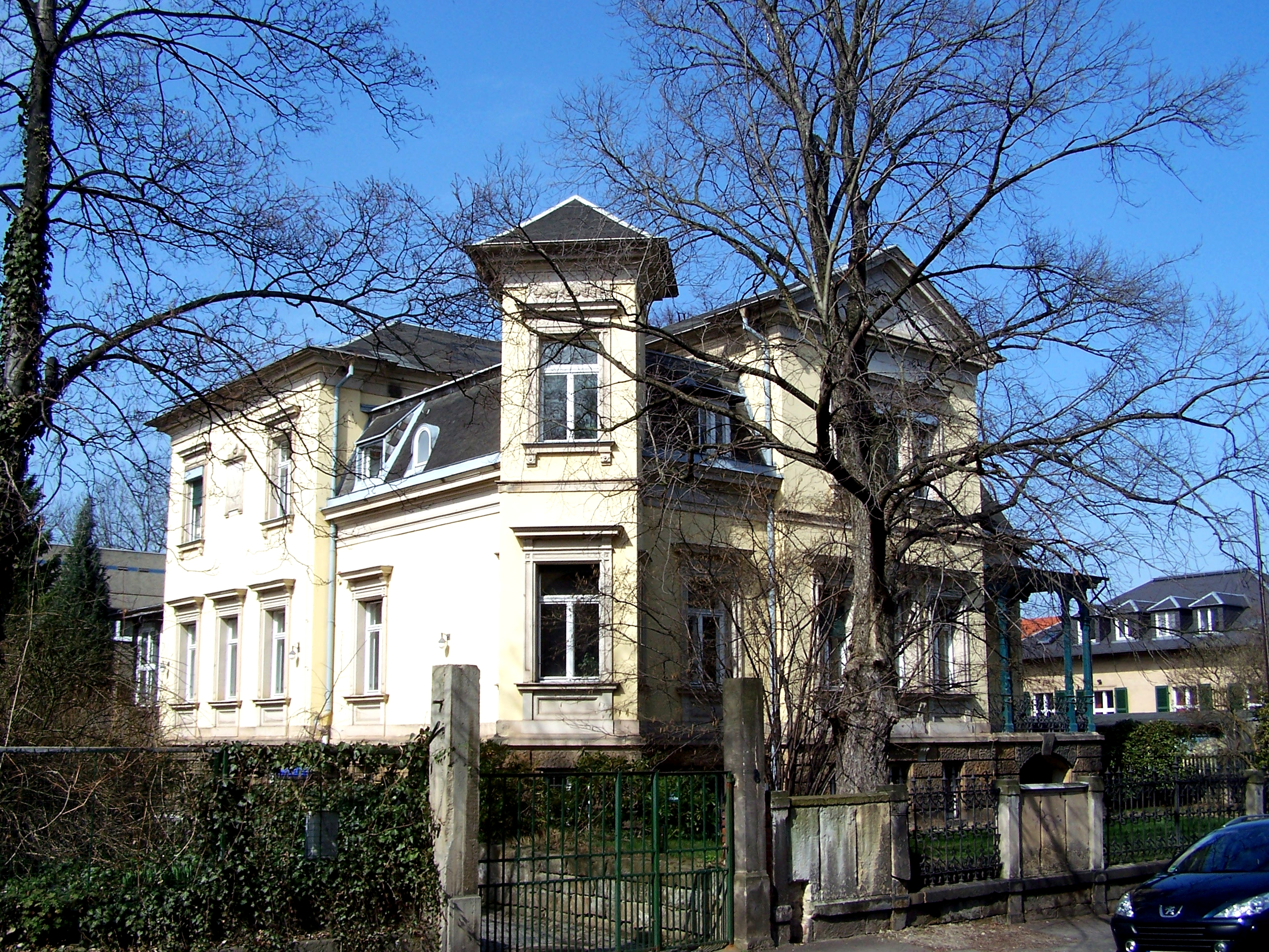 Hübnerstr. 8, Dresden